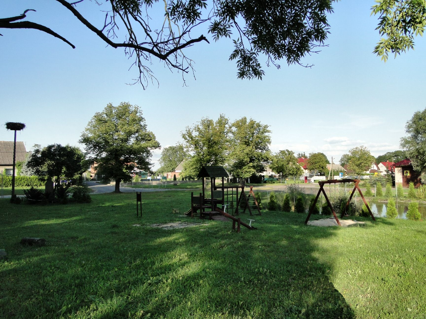 Smolęcin